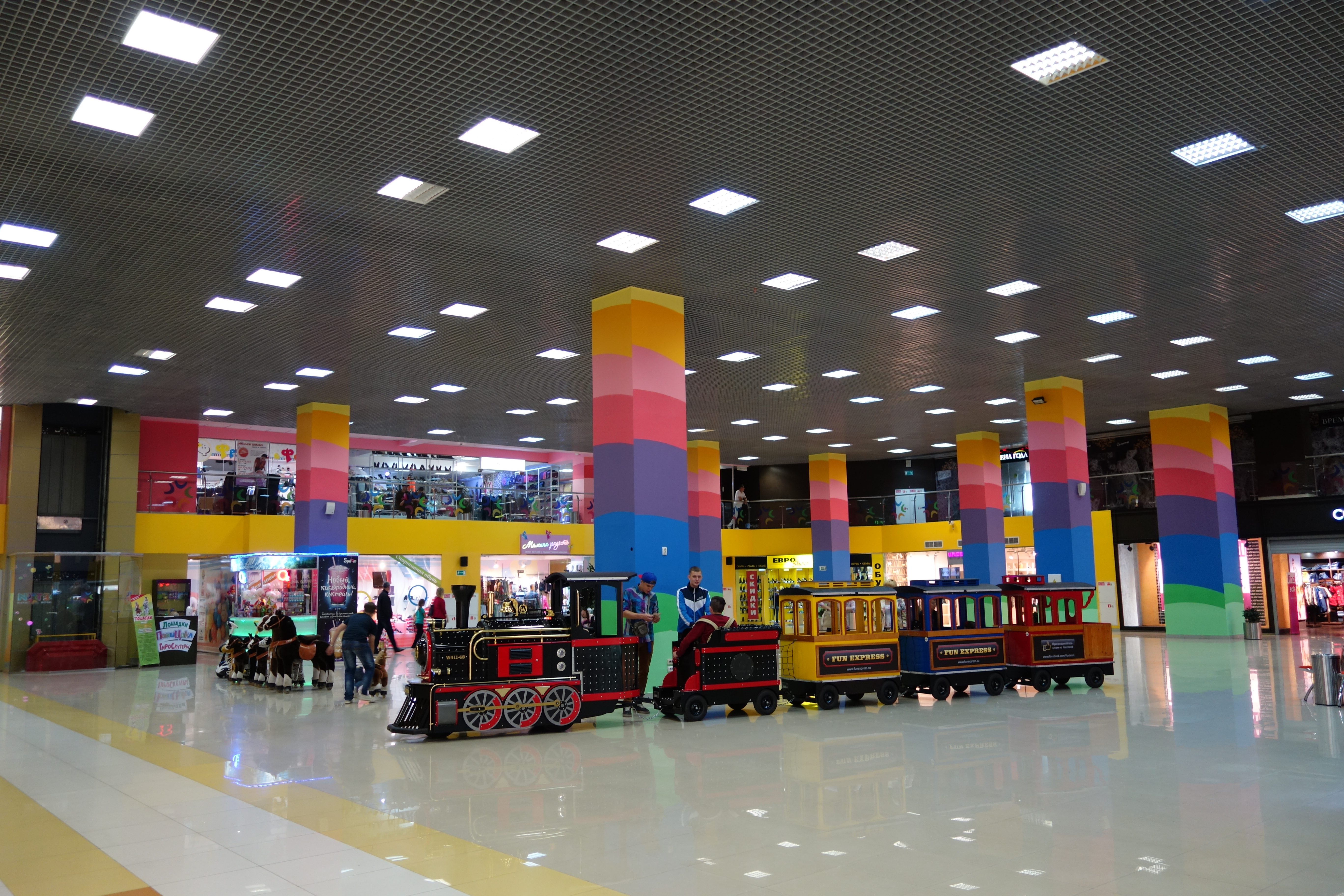 Сити-Молл. Южно-Сахалинск. Крупнейший торгово-развлекательный комплекс на Дальнем Востоке России. 2014 г.